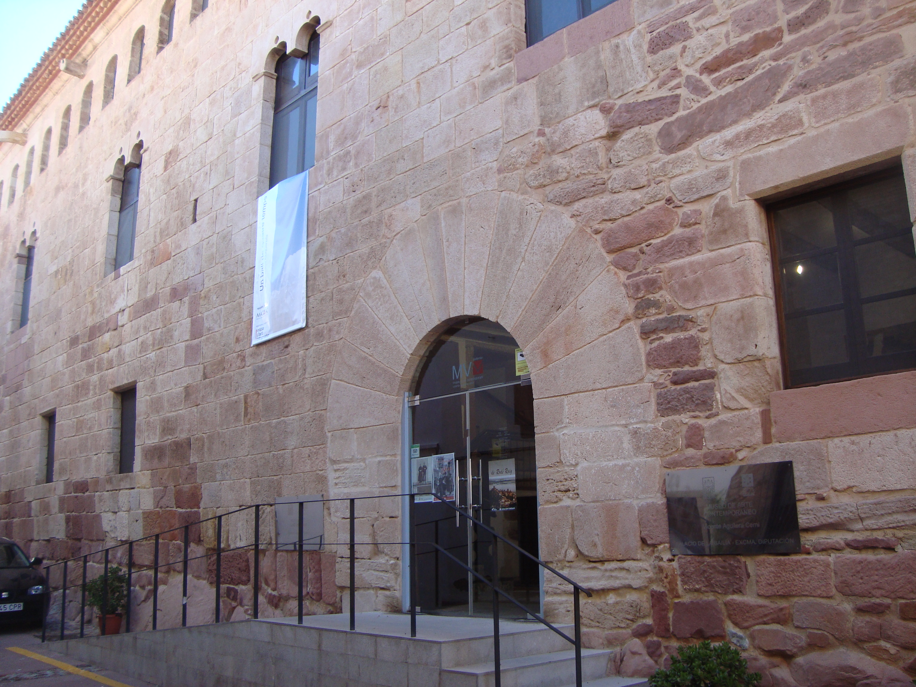 Palau del Batlle (Vilafamés) 05.128-008.